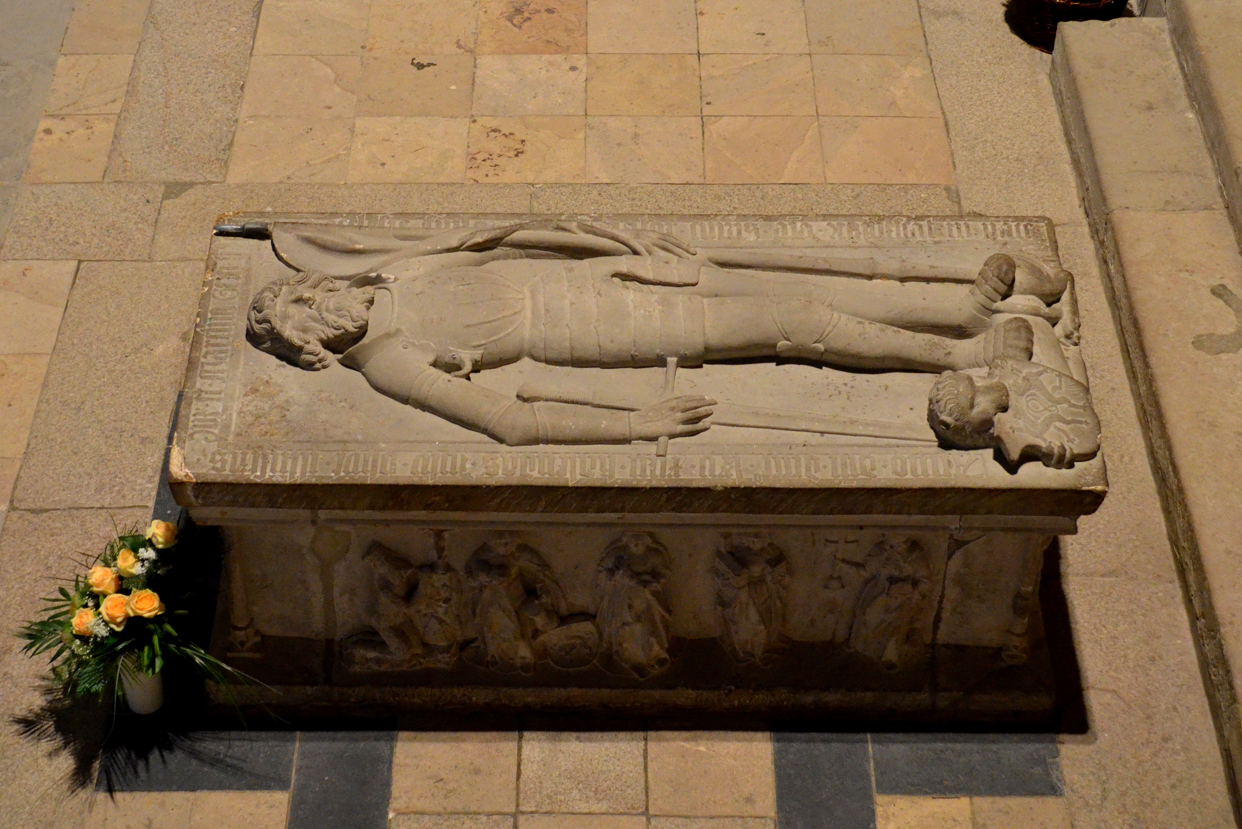 Stiftskerk sint-Cyriacus